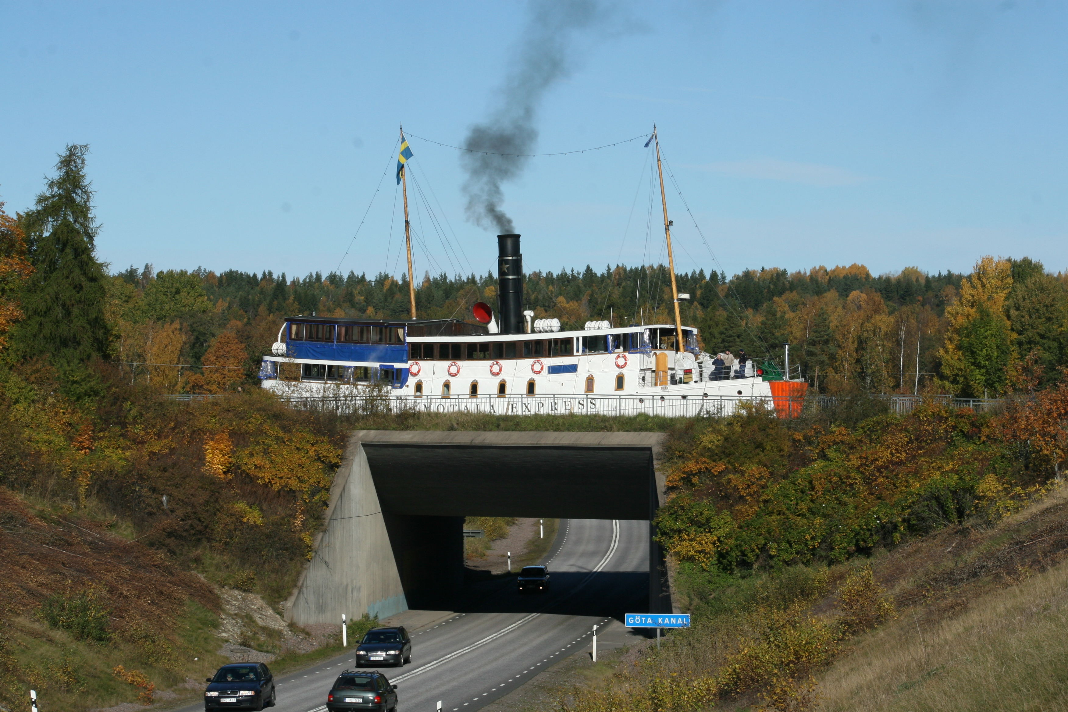 Motala Express vid Kungs Norrby akvedukt på väg från Motala mot Stockholm.